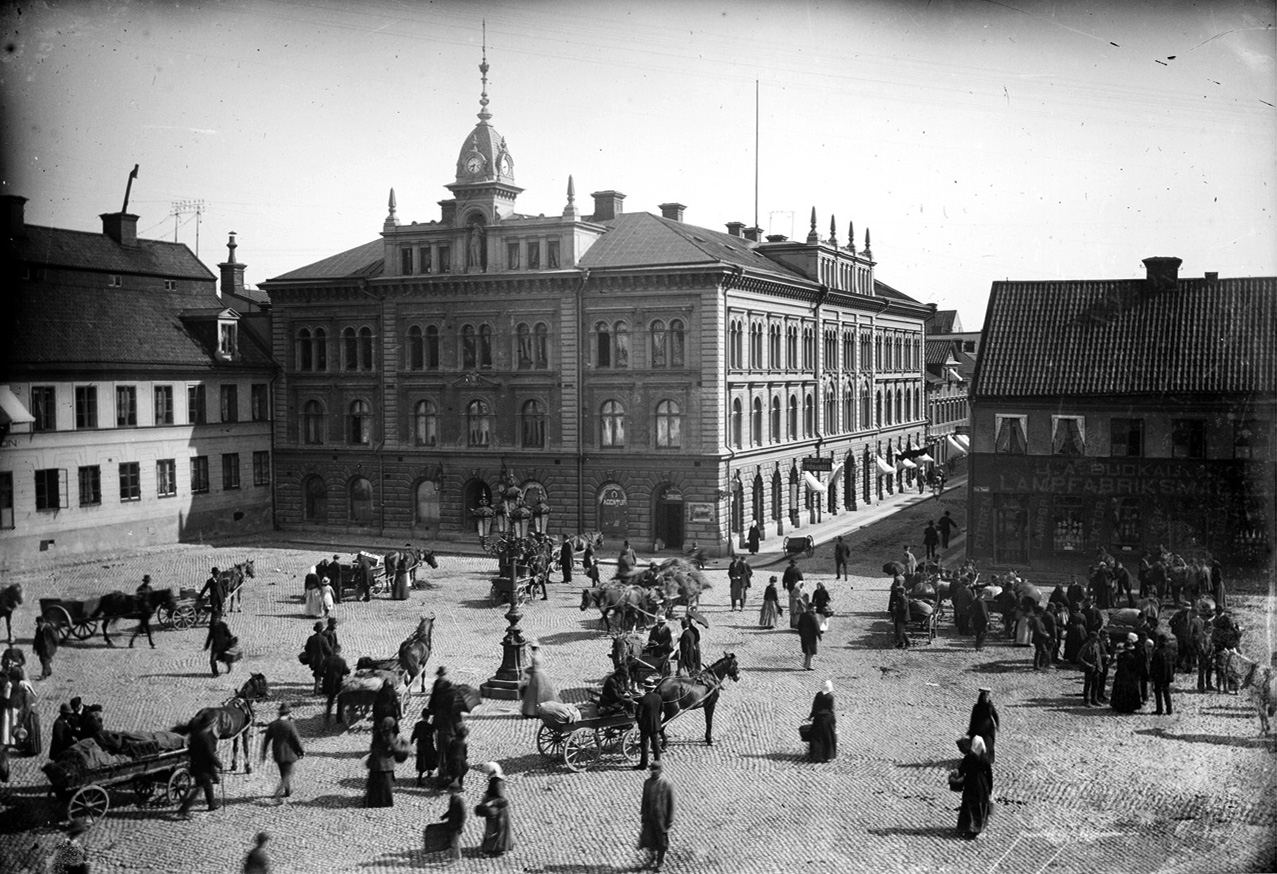 Stora torget, Uppsala, sannolikt 1890-tal. Uppsala, Sweden 1890 - 1900. Upplandsmuseet: OB3533 Flickr data on 2011-08-24: Tags: Uppsala, Uppland, Sweden License: CC BY 2.0 User: Upplandsmuseet Upplandsmuseet Länsmuseum för Uppsala län